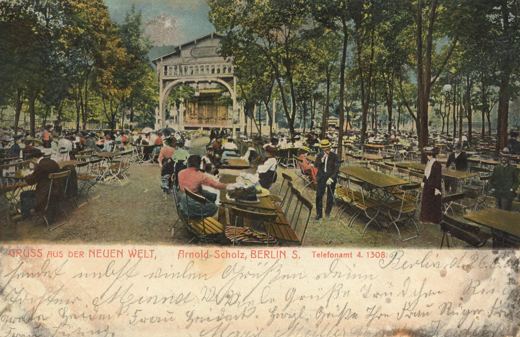 Der Biergarten Neue Welt im Volkspark Hasenheide in Berlin-Neukölln